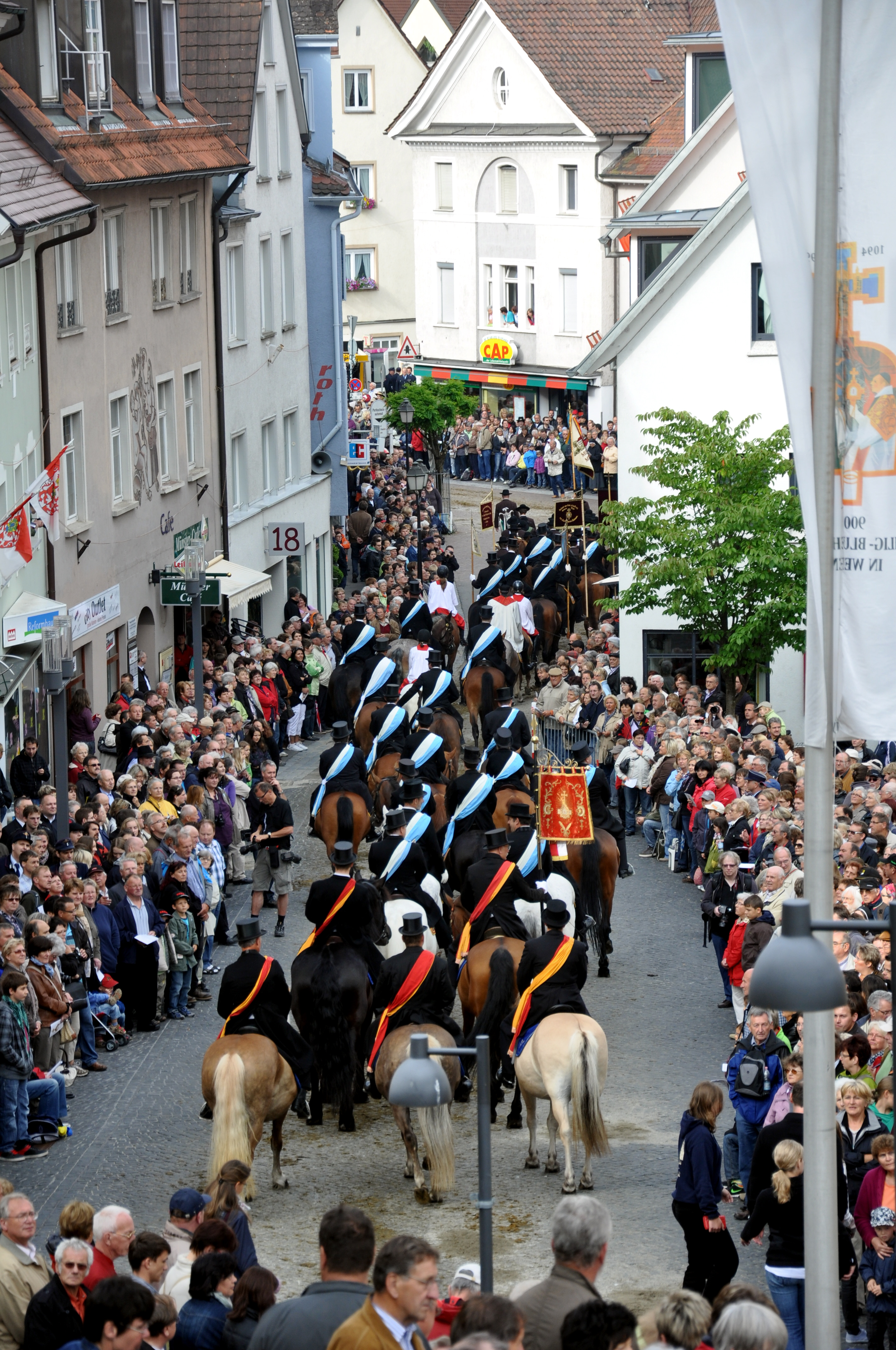 Weingarten, Blutritt 2011, Blick von der Treppe zwischen Stadt und Basilika auf den Blutritt